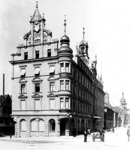 Hotel Silber in Stuttgart, Dorotheenstraße 10 am Karlsplatz in der ehemaligen Altstadt. Ursprünglich anno 1845 errichtet, präsentierte es sich ab 1874 in der hier gezeigten Form (Neorenaissance). Es wurde zu dieser Zeit von Heinrich Silber übernommen und umgebaut und bis 1919 als Hotel betrieben. 1919 bis 1928 beherbergte das Haus die Oberpostdirektion der Deutschen Reichspost für Württemberg, anschließend bis 1937 das Polizeipräsidium. Von 1937 bis 1945 war das Gebäude Sitz der Gestapo. Bei einem Luftangriff im September 1944 wurden Teile des Gebäudes zerstört, es konnte jedoch weiter in seiner Funktion genutzt werden. Das Haus wurde bald nach Kriegsende wieder als Stuttgarter Polizeizentrale genutzt, die zerstörten Teile wurden 1946/1947 neu aufgebaut. Es behielt seine neue Funktion bis 1984/1985, als es vom Innenministerium übernommen wurde. Siehe auch: Hotel Silber